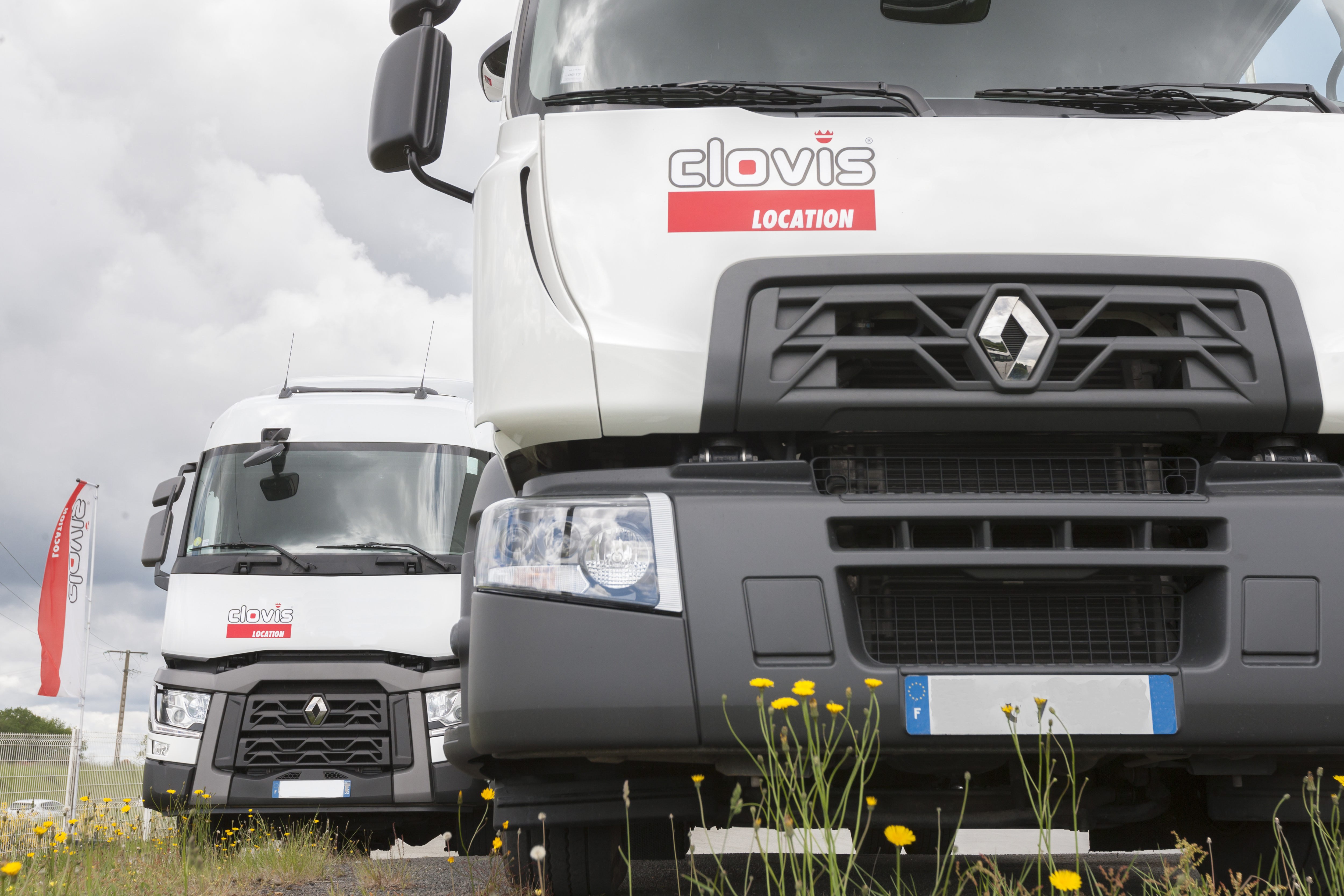 Photo Véhicules Clovis Location sur parc